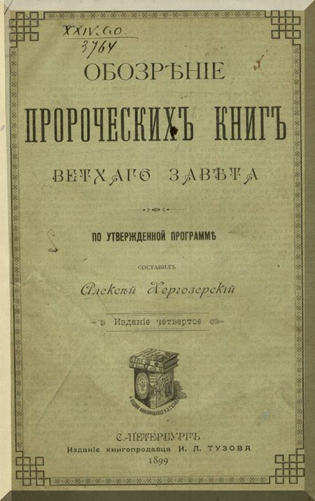 Обозренiе пророческихъ книгъ Ветхаго Завета : по утвержденной программе / Алексей Хергозерскiй